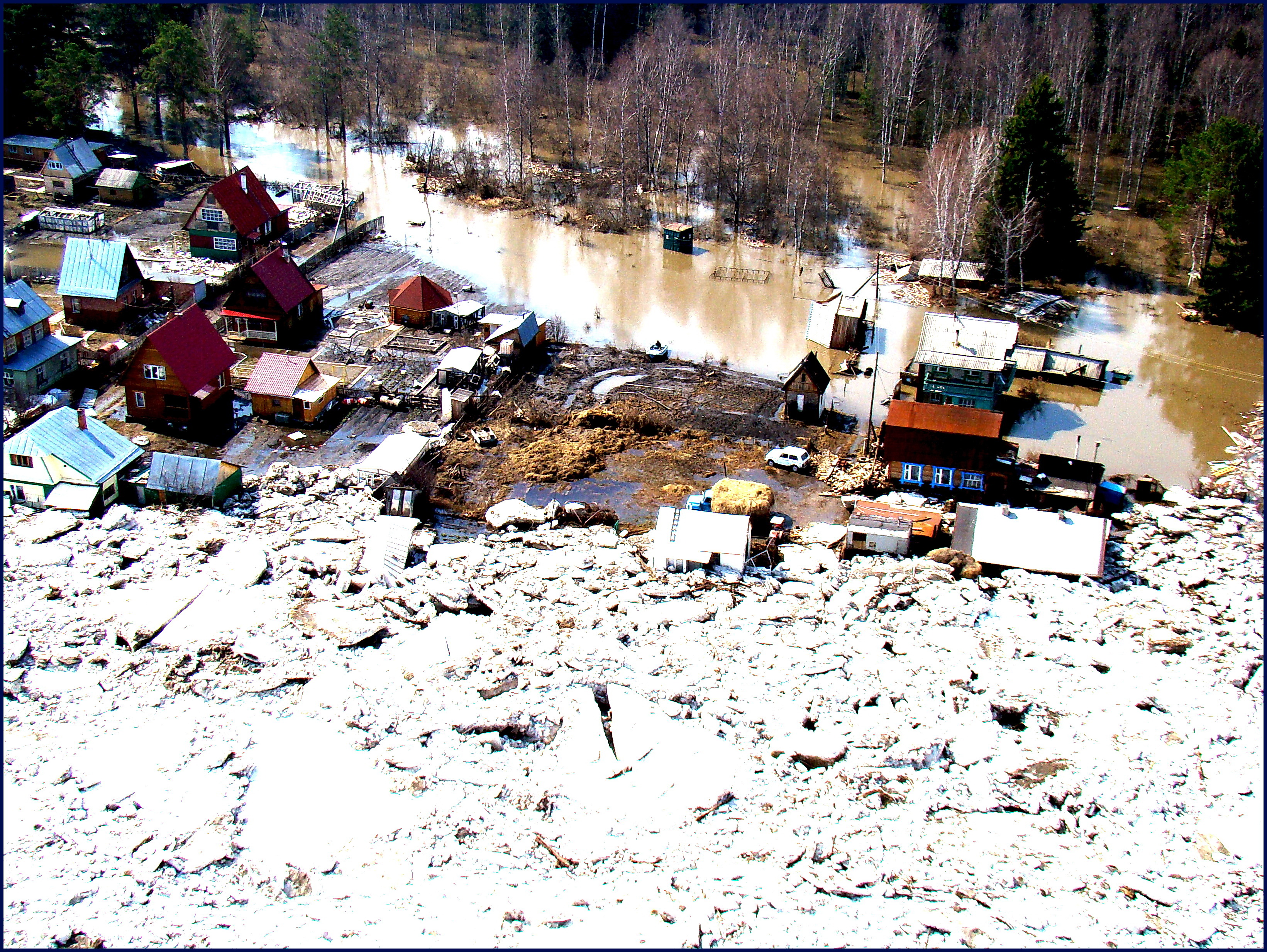 Аномально сложное прохождение ледохода по реке Томи в Западной Сибири 29 апреля 2010 года. Фото А. Н. Рудого. Не публиковалось. Собственное фото.